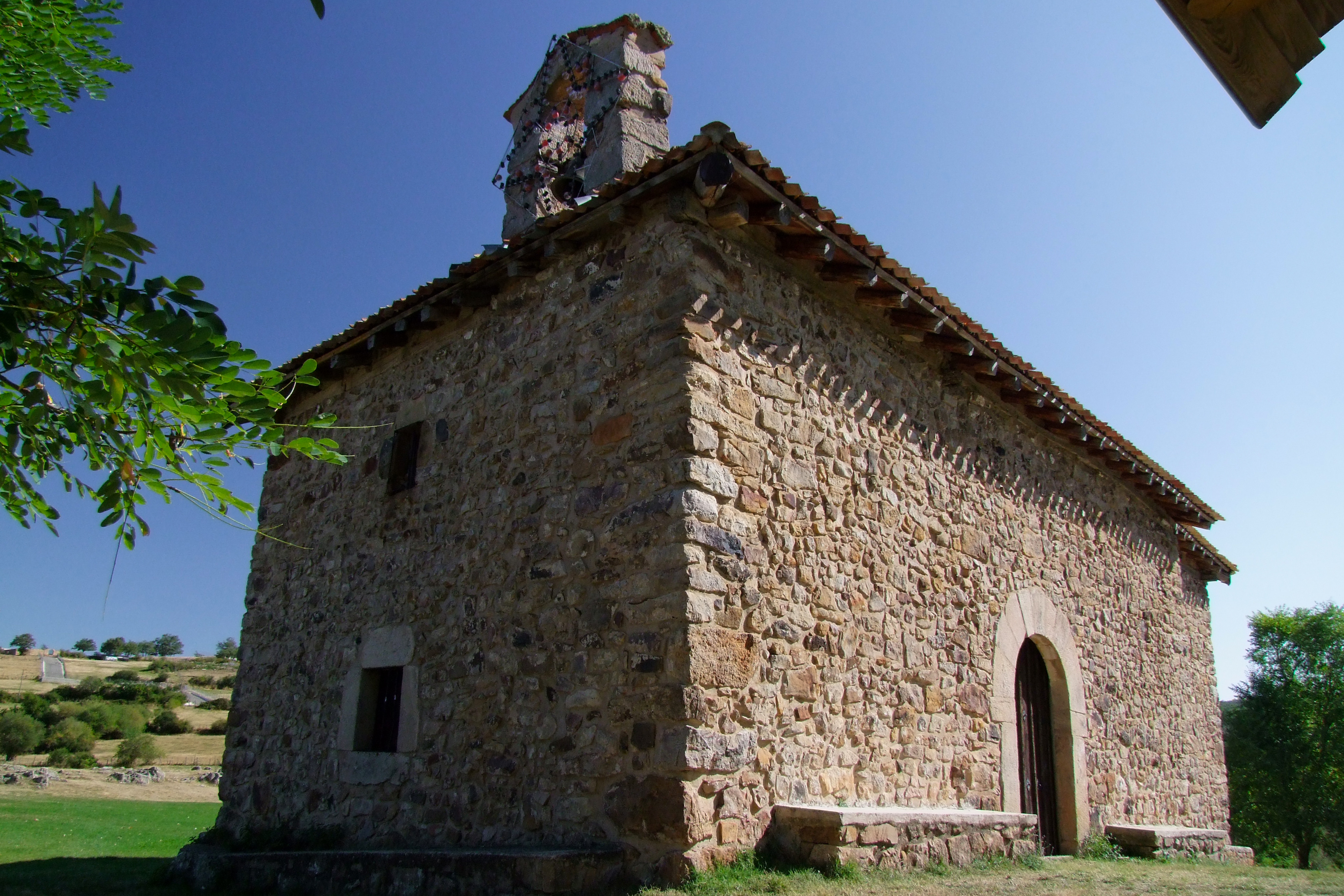 Ermita de San Martín en la localidad de Lumbreras, La Rioja - España